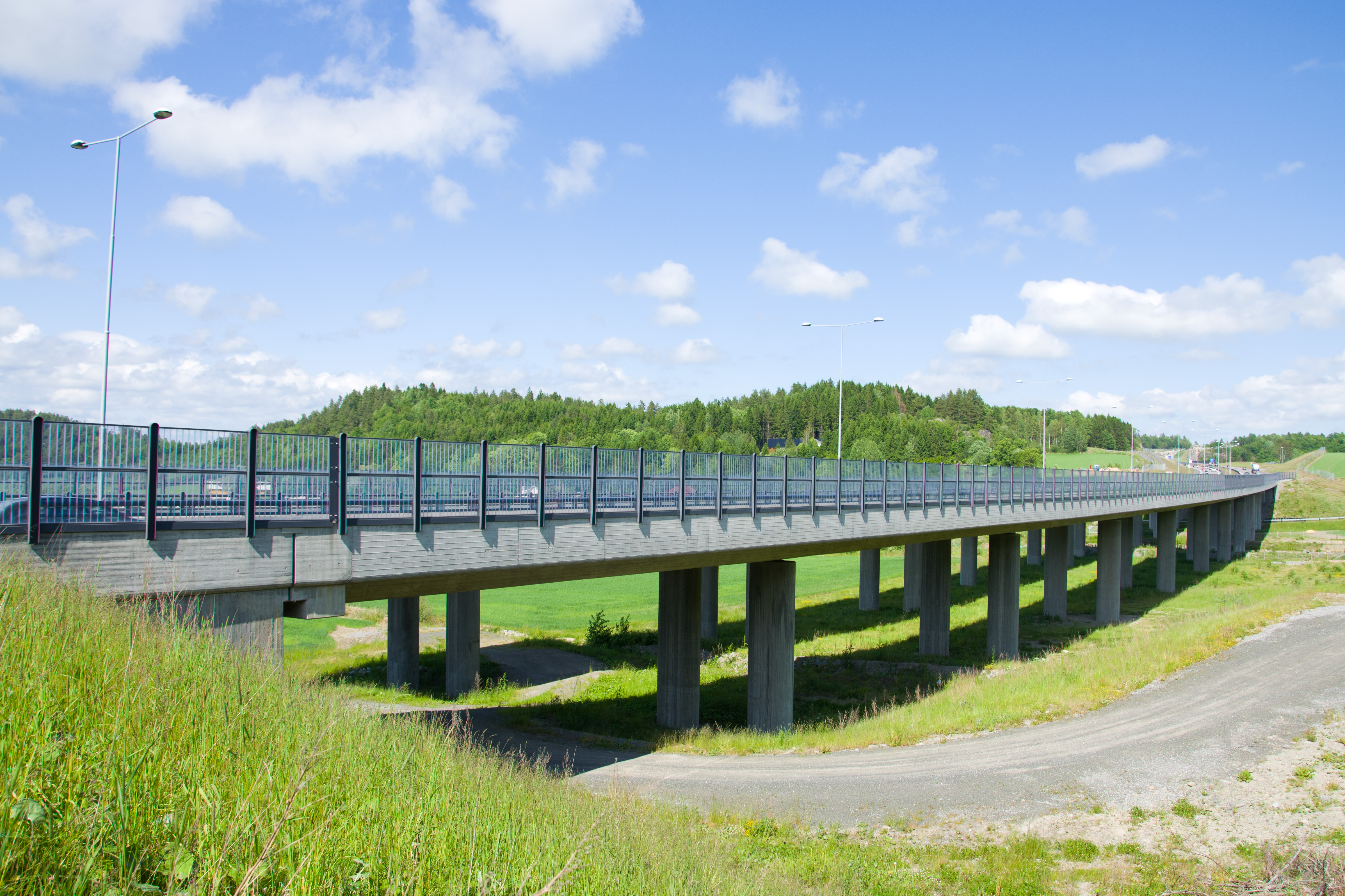 Seierstadbrua på E18 mellom Sandefjord og Larvik